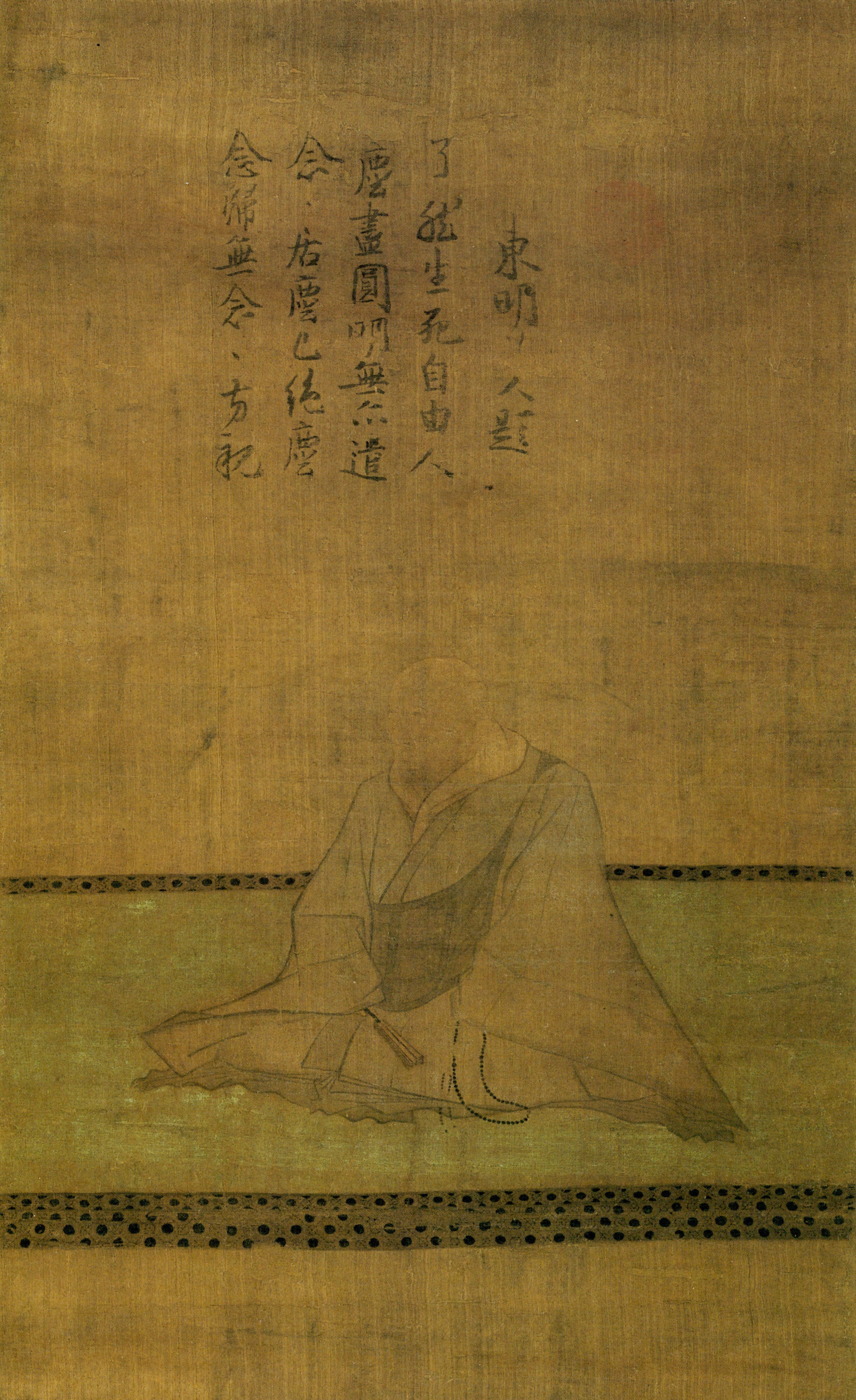 北条実泰とされる肖像。